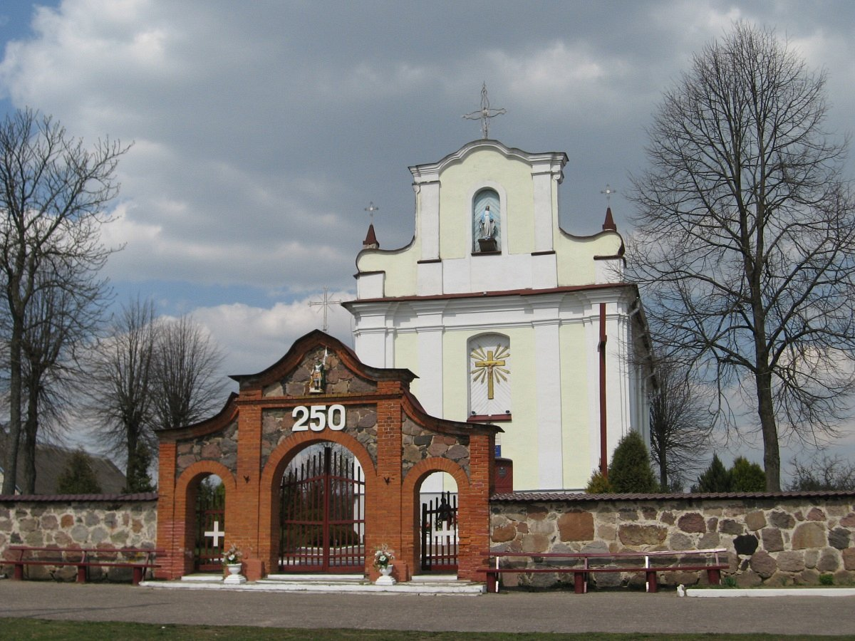 Касцяневічы. Касцёл Беззаганнага Зачацця Найсвяцейшай Дзевы Марыі